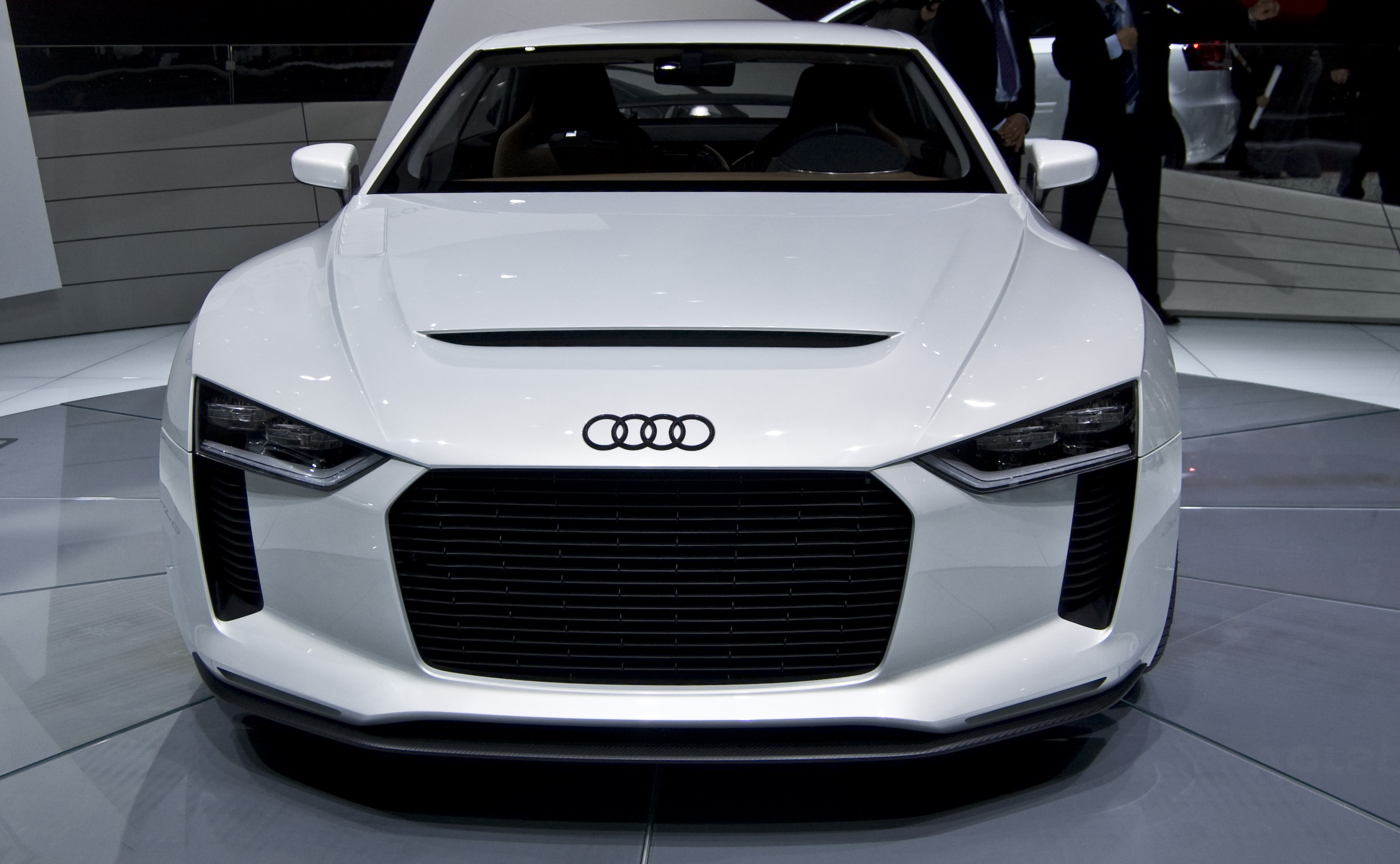 Audi Quattro Concept en el Salón de París 2010